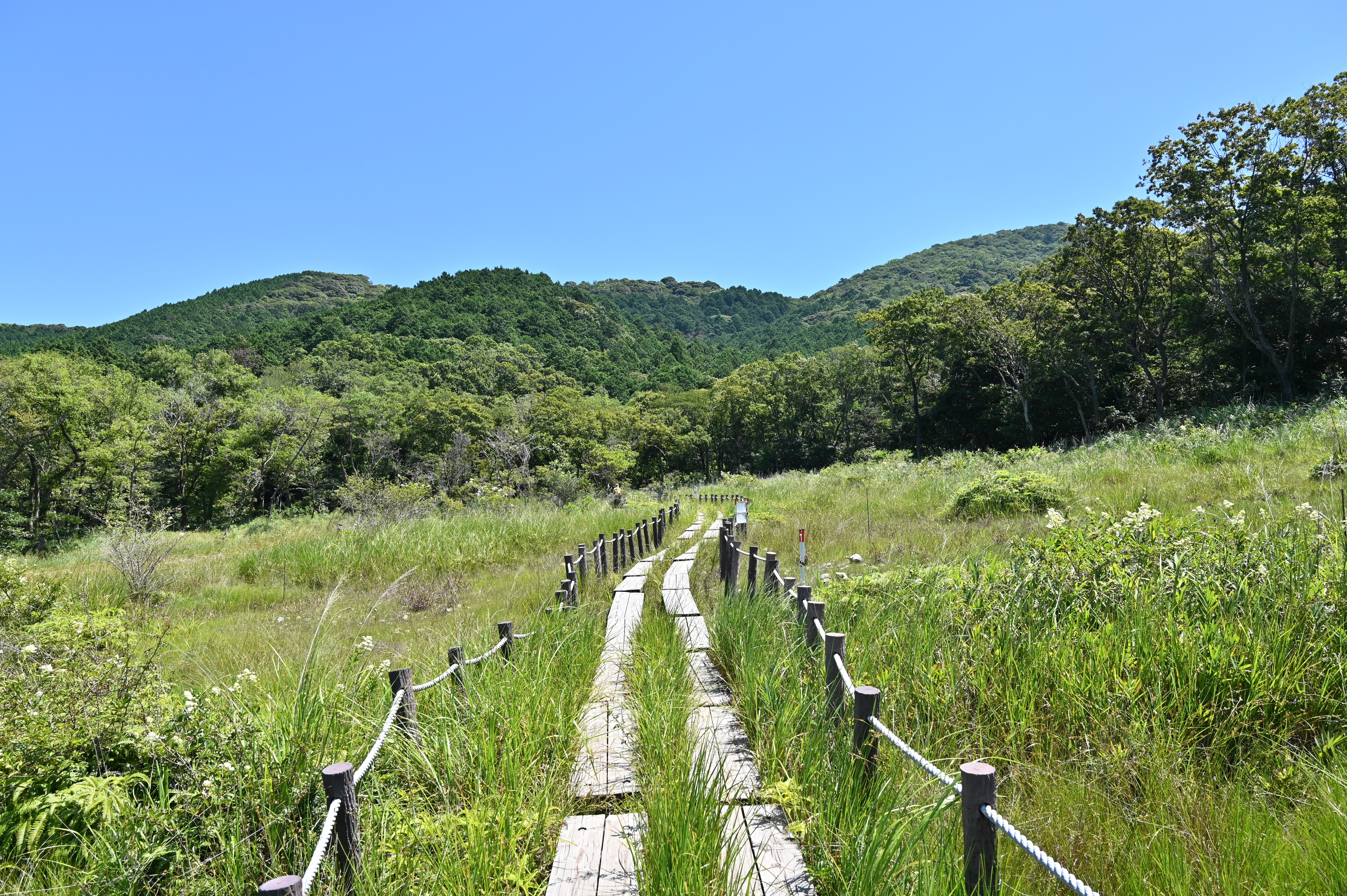 夏の葦毛湿原